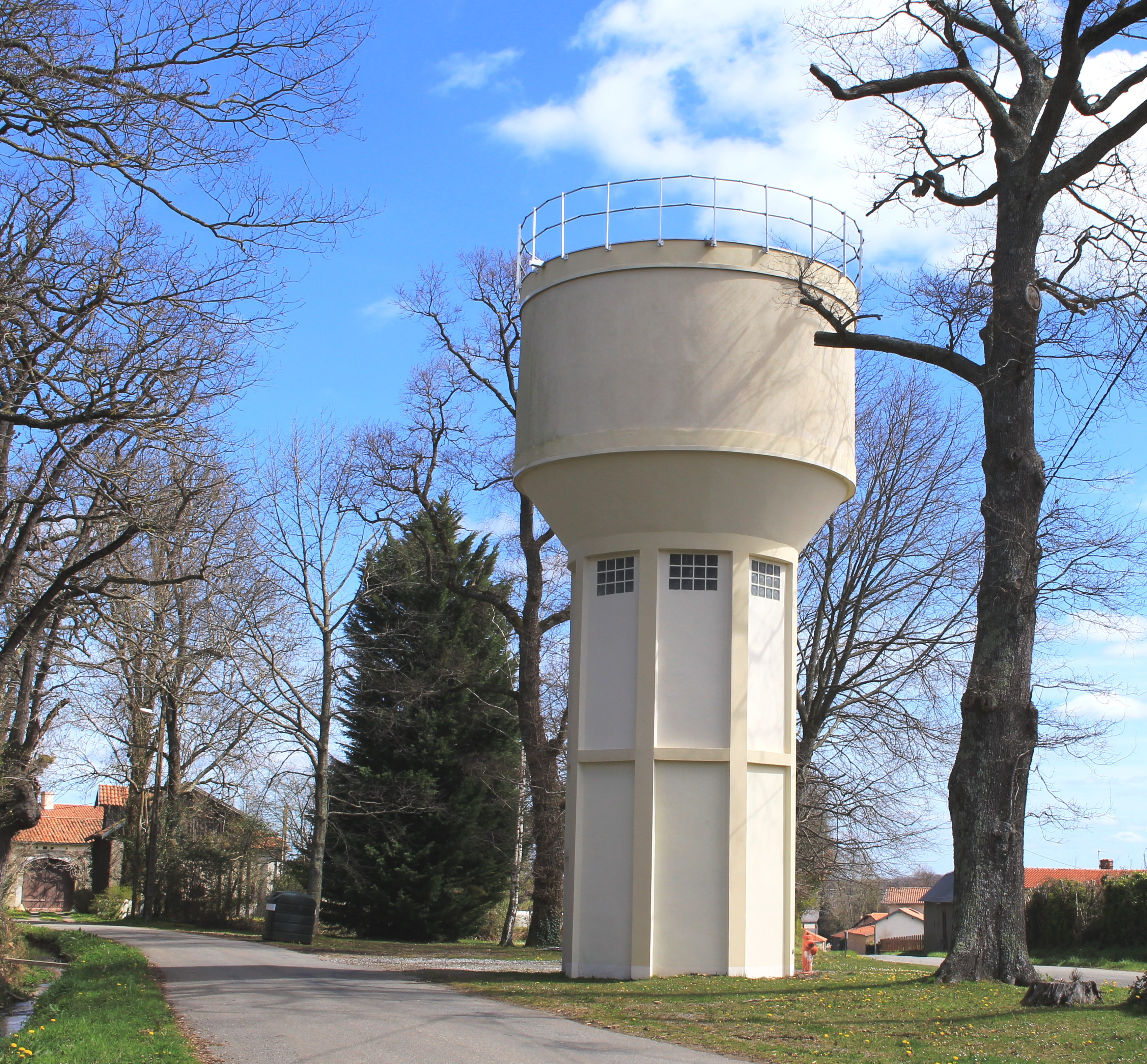 Château d'eau de Clarens (Hautes-Pyrénées)